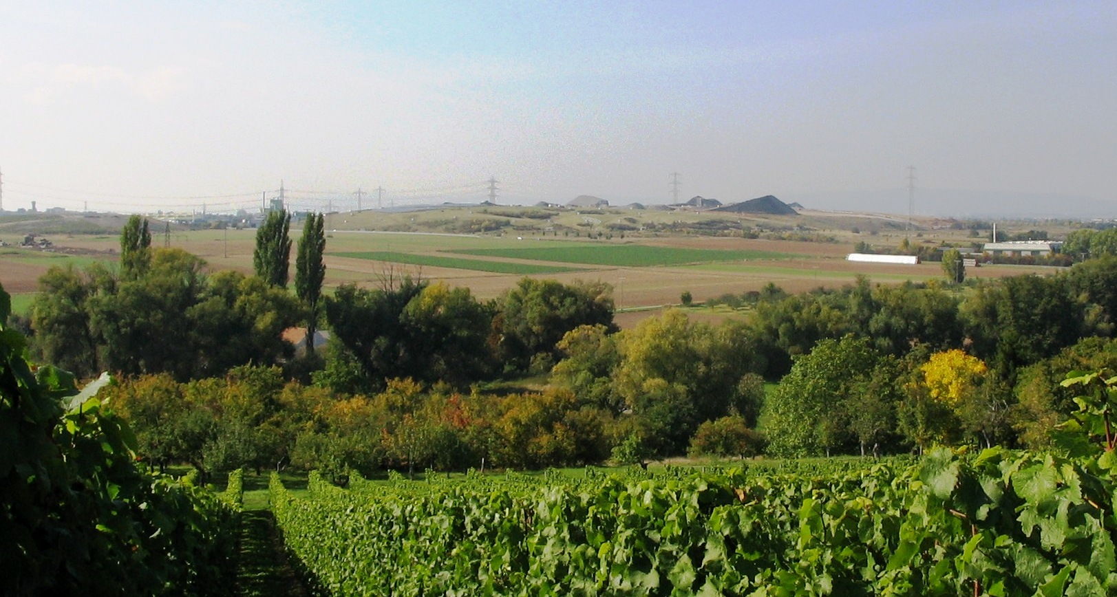 Blick von der Flörsheimer Warte über die Wickerbachaue auf die Kreismülldeponie Flörsheim-Wicker